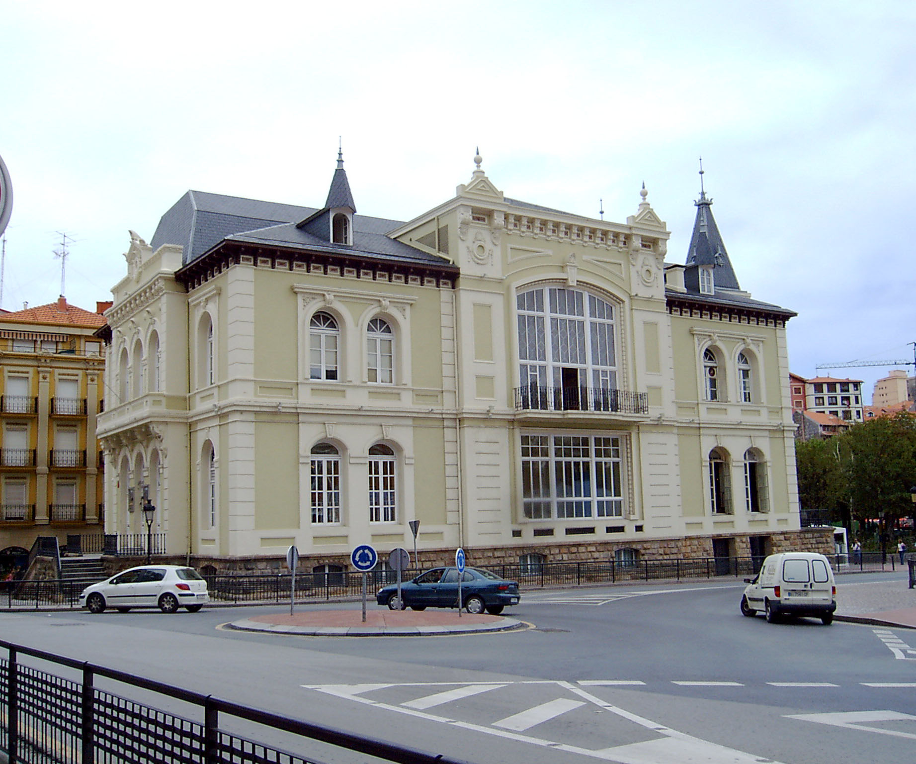 Bermeo_casino_edifice